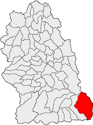 Categorie:Hărţi ale judeţului Hunedoara